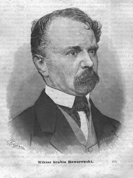 Граф Віктор Баворовський